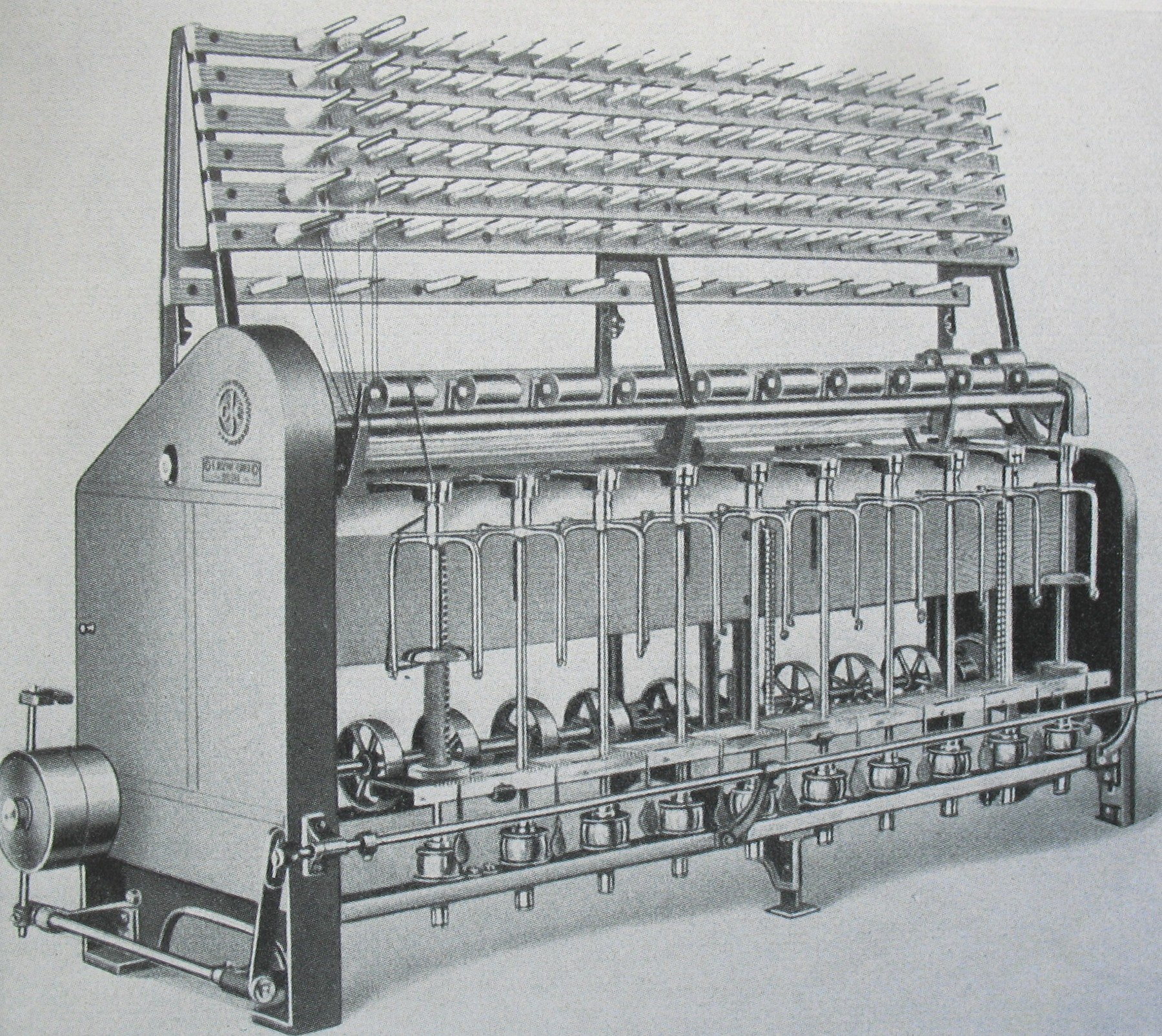 Flügelzwirnmaschine (1920er Jahre)